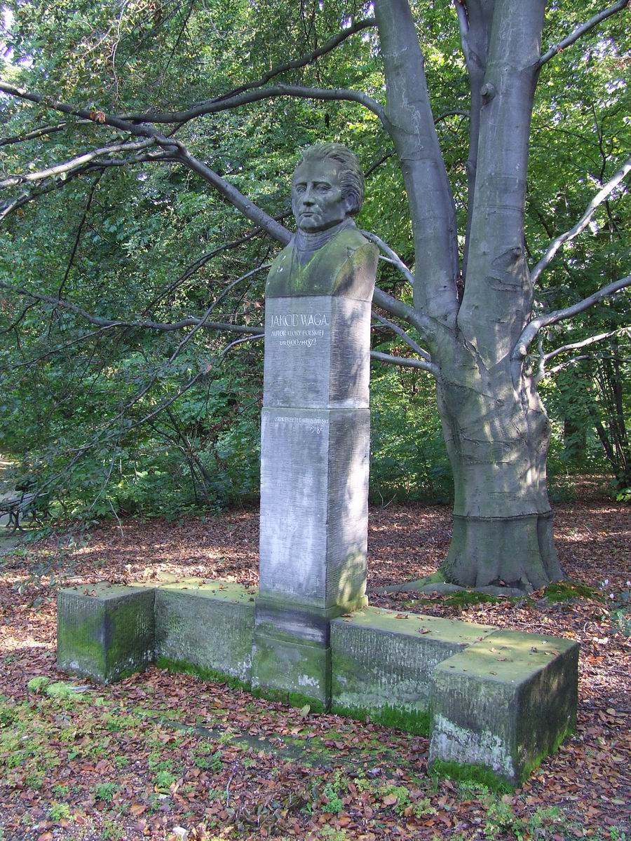 Jakób Waga, popiersie, Ogród Botaniczny UW w Warszawie